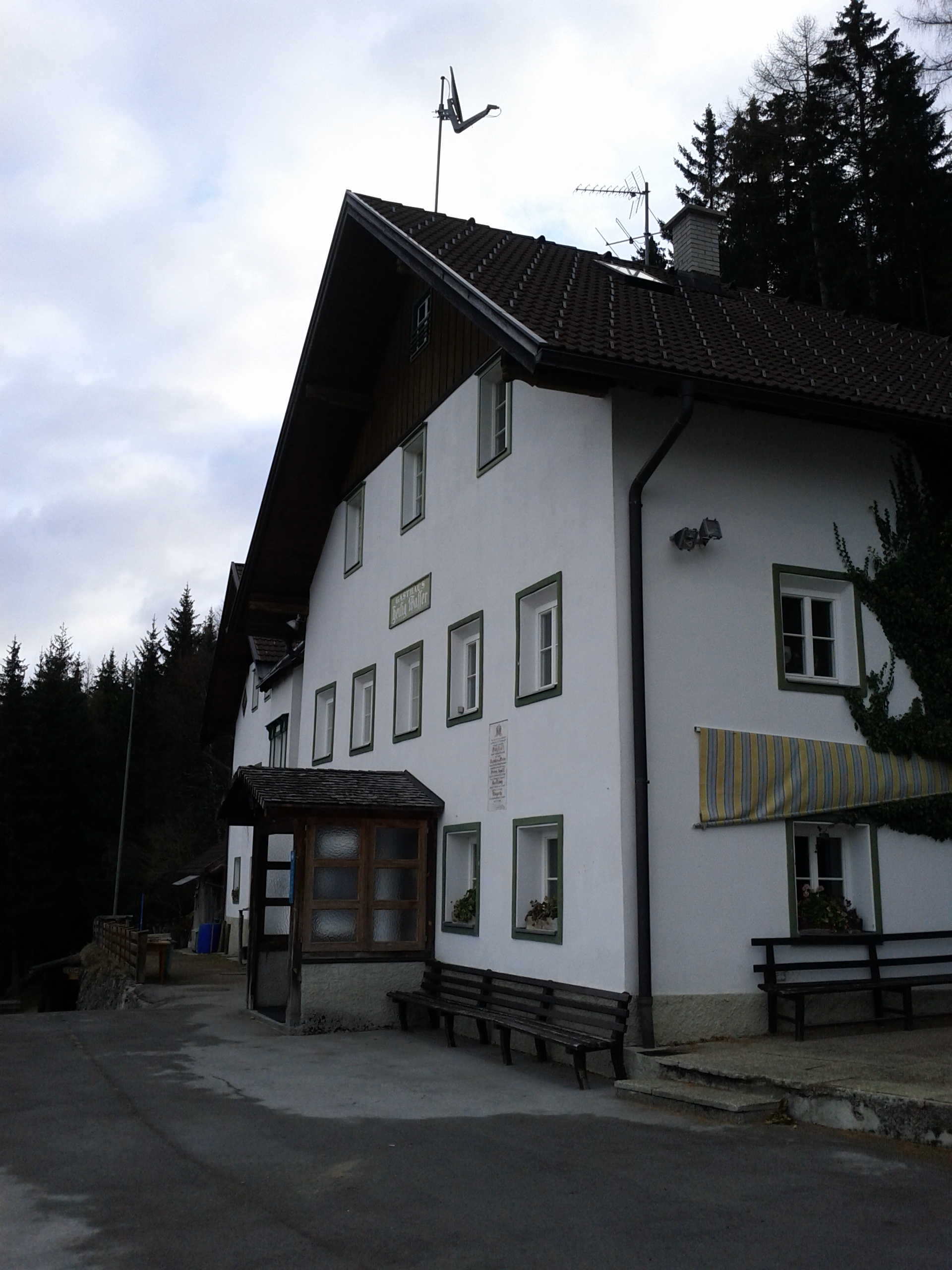 Wallfahrtsgasthaus Heiligwasser This media shows the remarkable cultural object in the Austrian state of Tyrol listed by the Tyrolean Art Cadastre with the ID 115969. (on tirisMaps, pdf, more images on Commons, Wikidata)